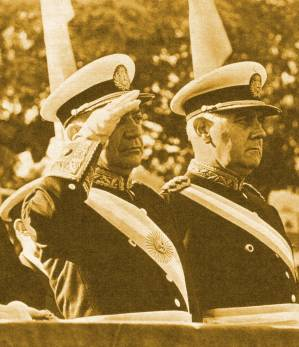 Es una foto del recién electo presidente de facto Roberto Marcelo Levingston (primero) y Alejandro Lanusse (segundo).